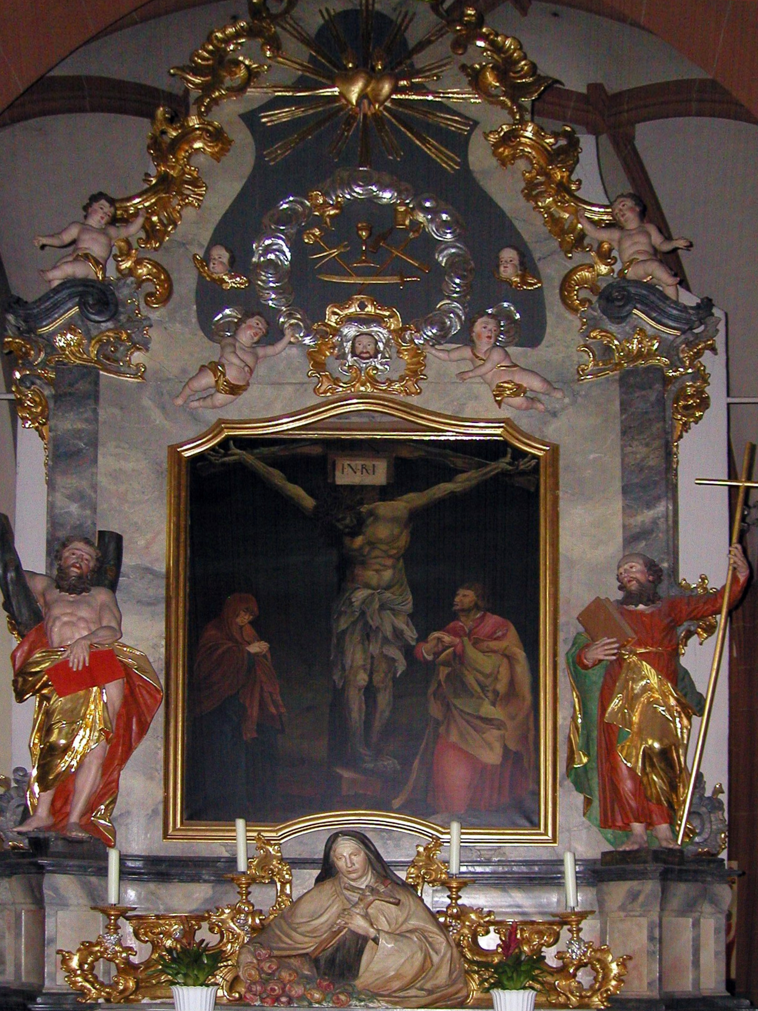 Kopie der Kreuzigung des "Tauberbischofsheimer Altar"s von Matthias Grünewald in der Stadtkirche St. Martin in Tauberbischofsheim